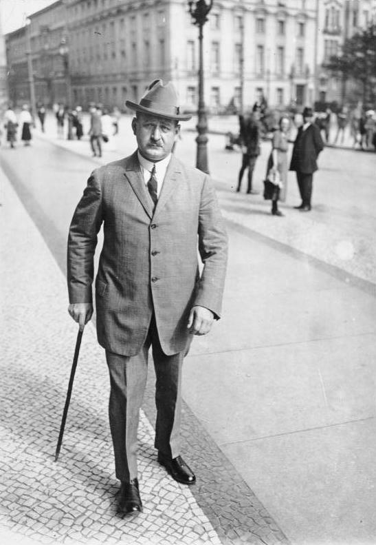 Der frühere sozialdemokratische Reichskanzler Bauer, verhaftet ! Der frühere sozialdemokratische Reichskanzler Bauer wurde in Berlin verhaftet.